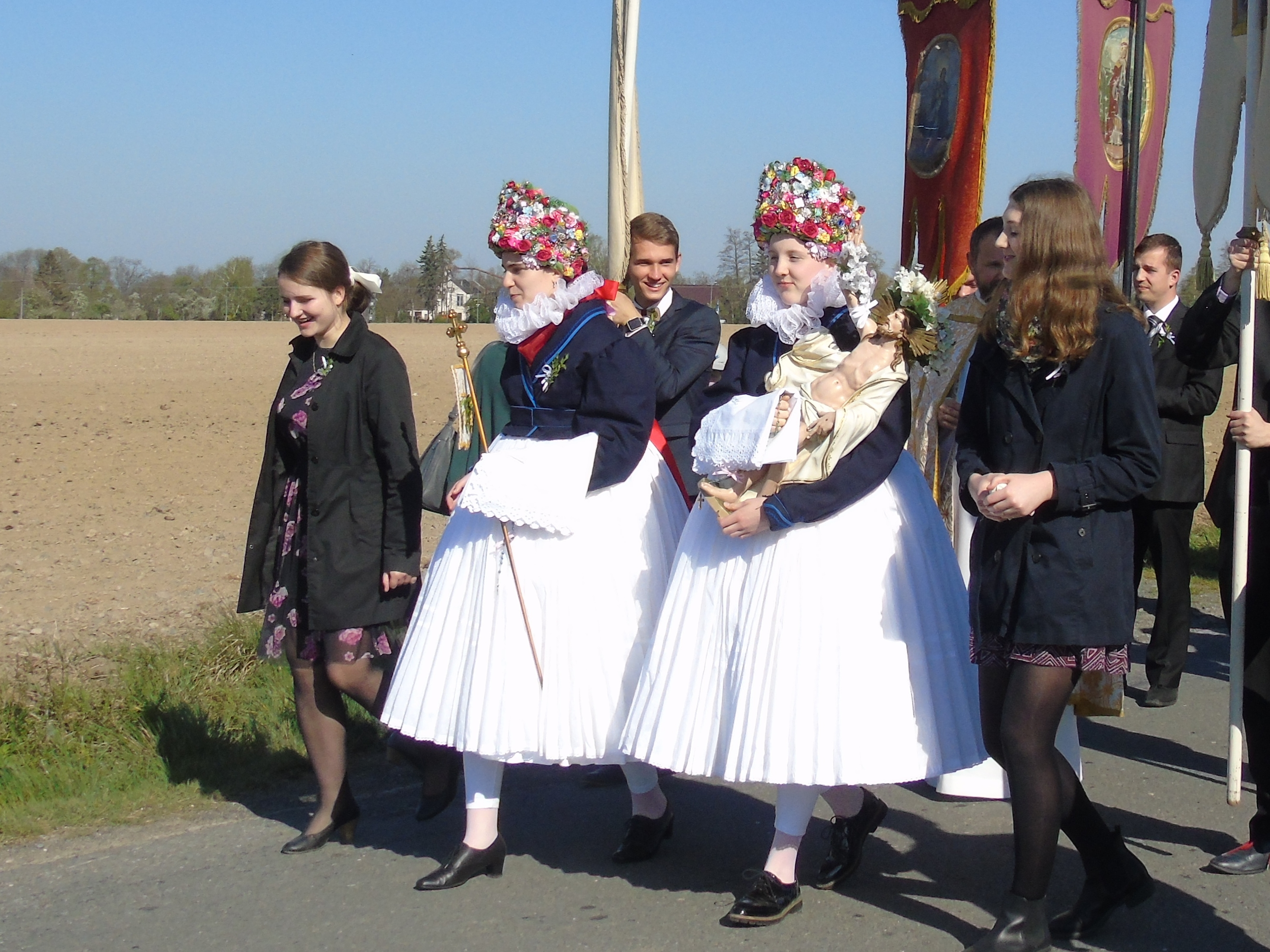 Kristovy Matičky z Bělkovic nesou do kostela sošku Krista a kříž.